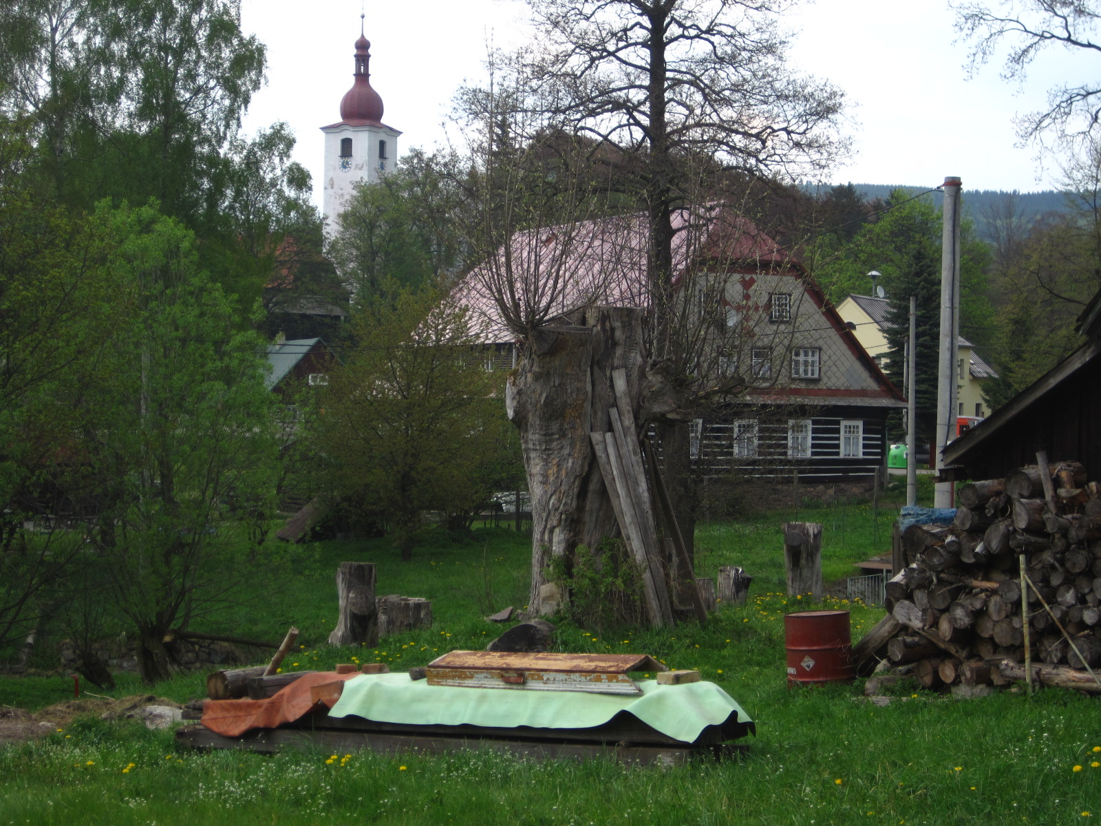 Kostel Všech svatých, Sedloňov.